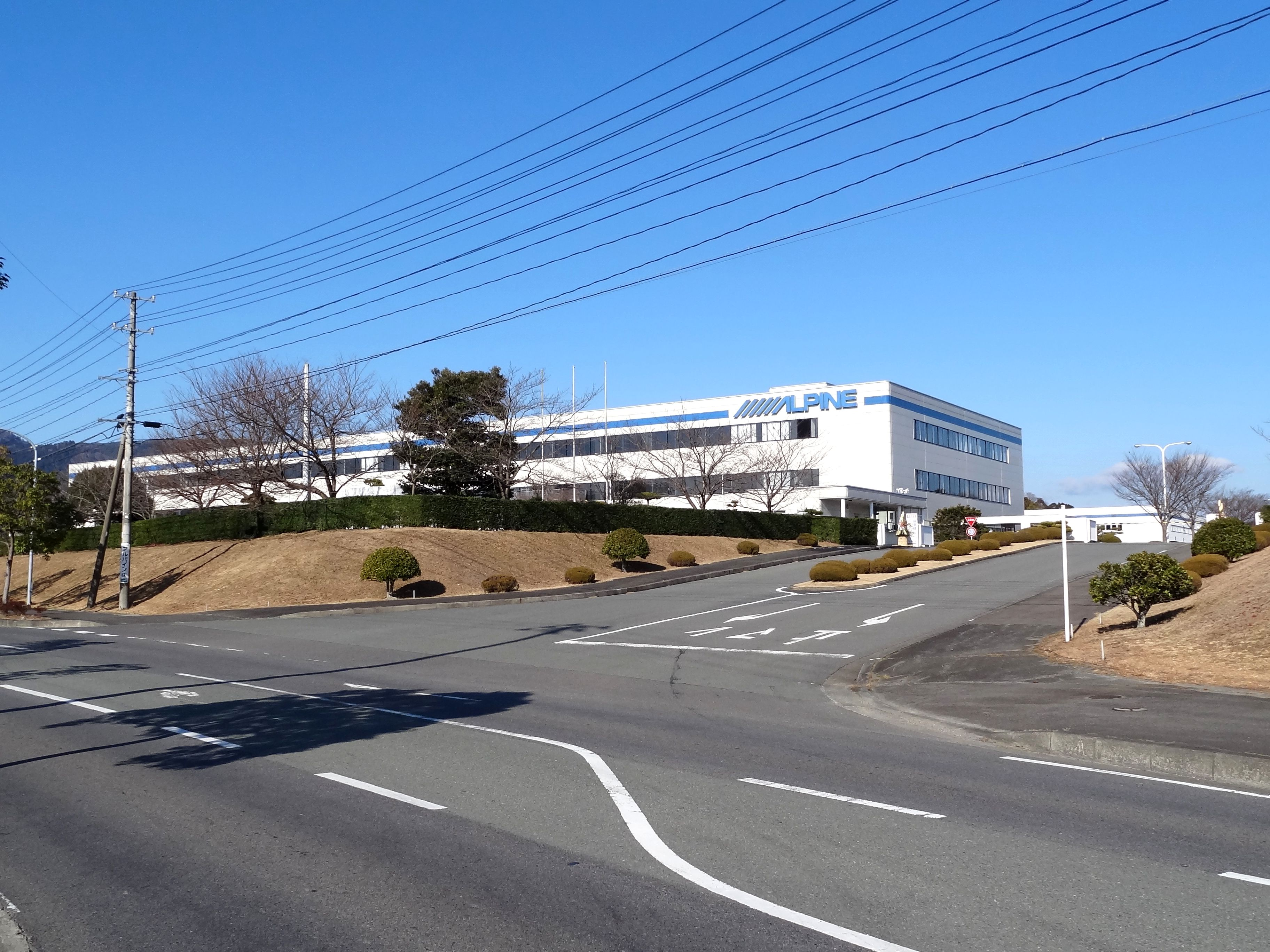 アルパインいわき本社